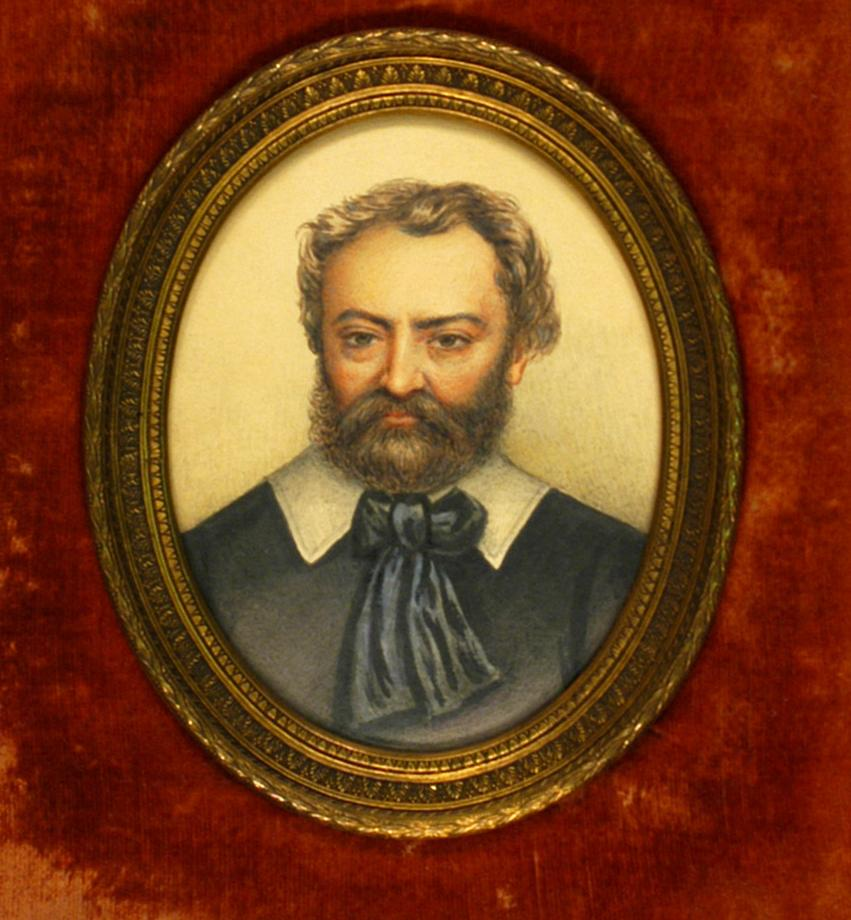 Erkel Ferenc. Ismeretlen művész színezett ceruzarajza és gouache, 1860-es évek eleje. Papír, bársony alapra applikálva Országos Széchényi Könyvtár, Színháztörténeti Tár